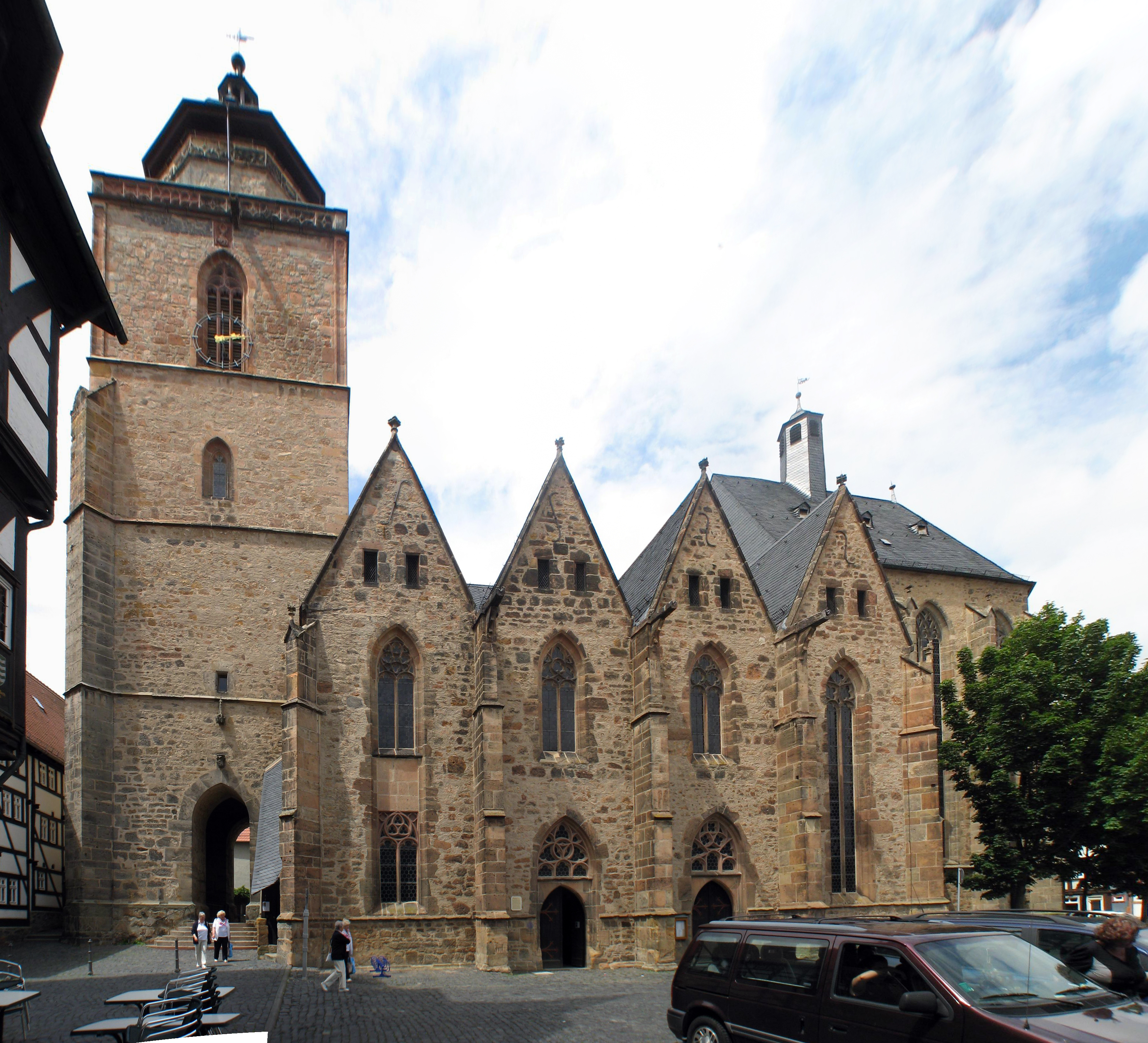 Walpurgiskirche in Alsfeld, Germany